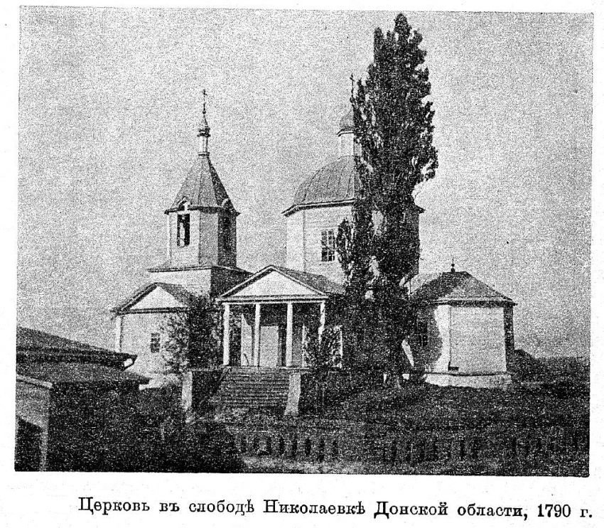 Ростовская область. Шептуховка. Церковь Николая Чудотворца в Николавке-Янове